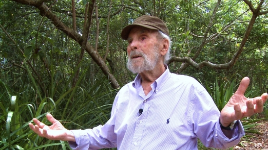 Frans Krajcberg (Kozienice, 12 de abril de 1921) é um pintor, escultor, gravador e fotógrafo, artista plástico nascido na Polônia e naturalizado brasileiro.